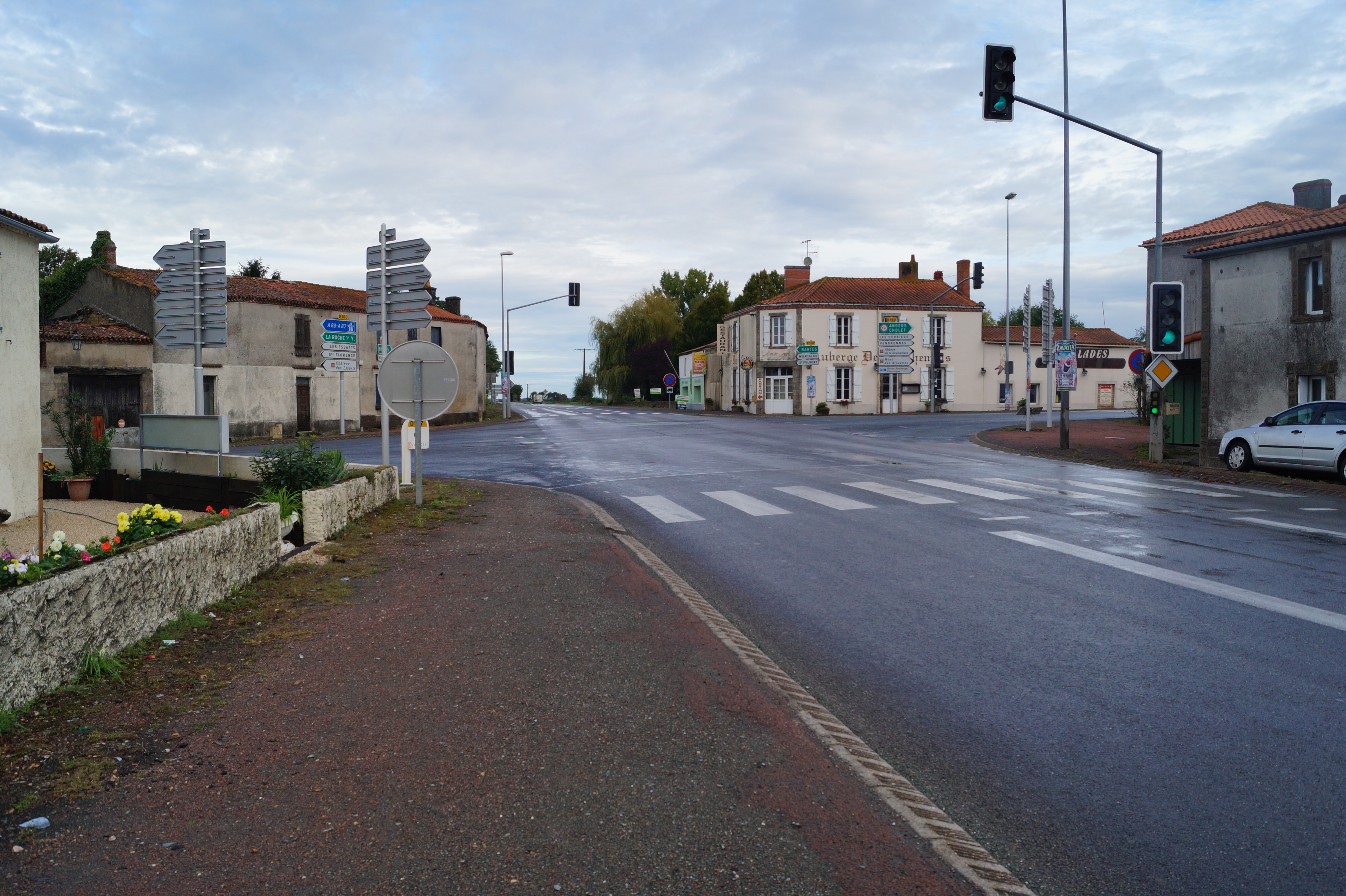 Les Quatre-Chemins-de-l’Oie (route de L’Oie).